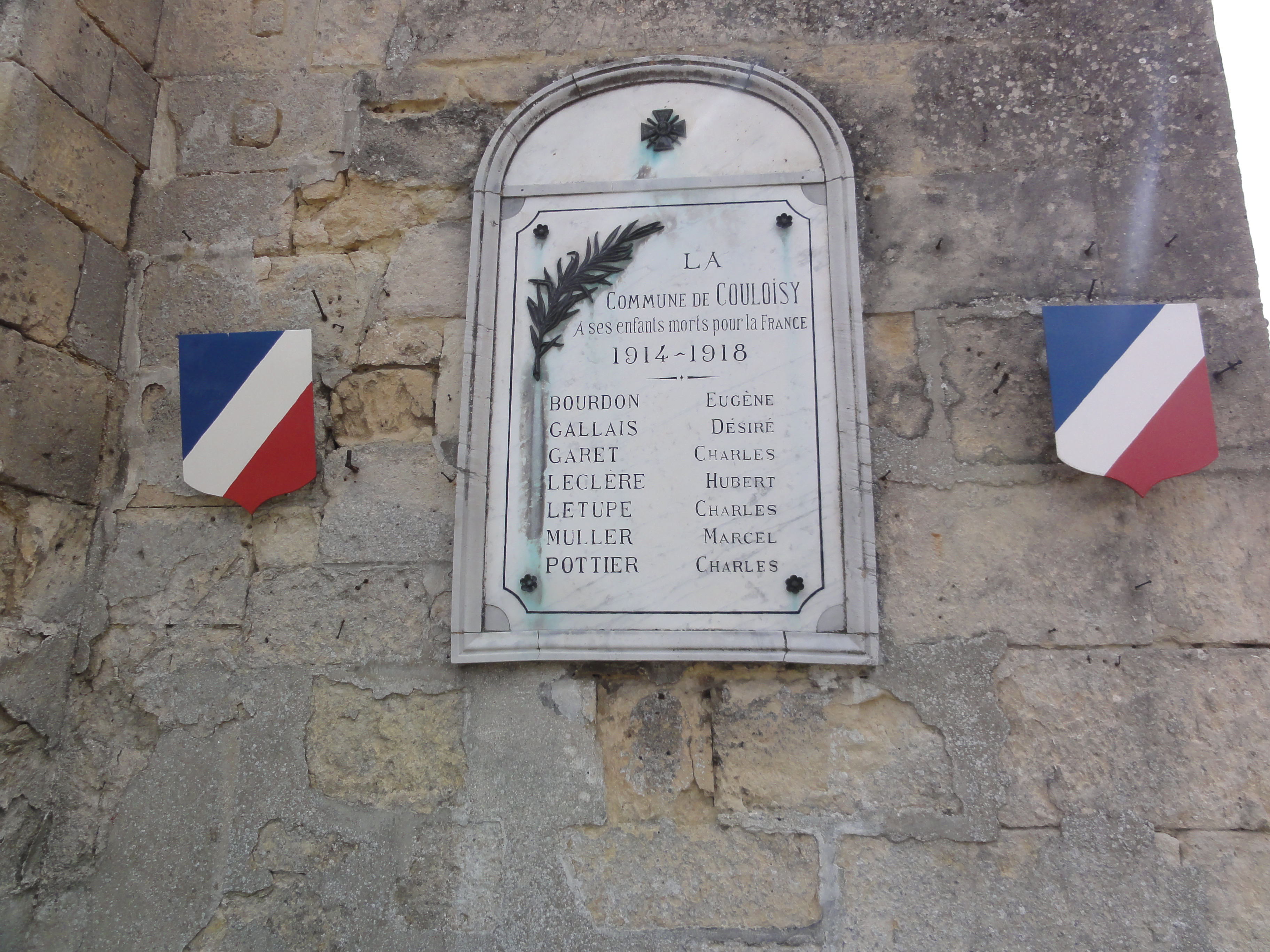 Couloisy (Oise) Monument aux morts